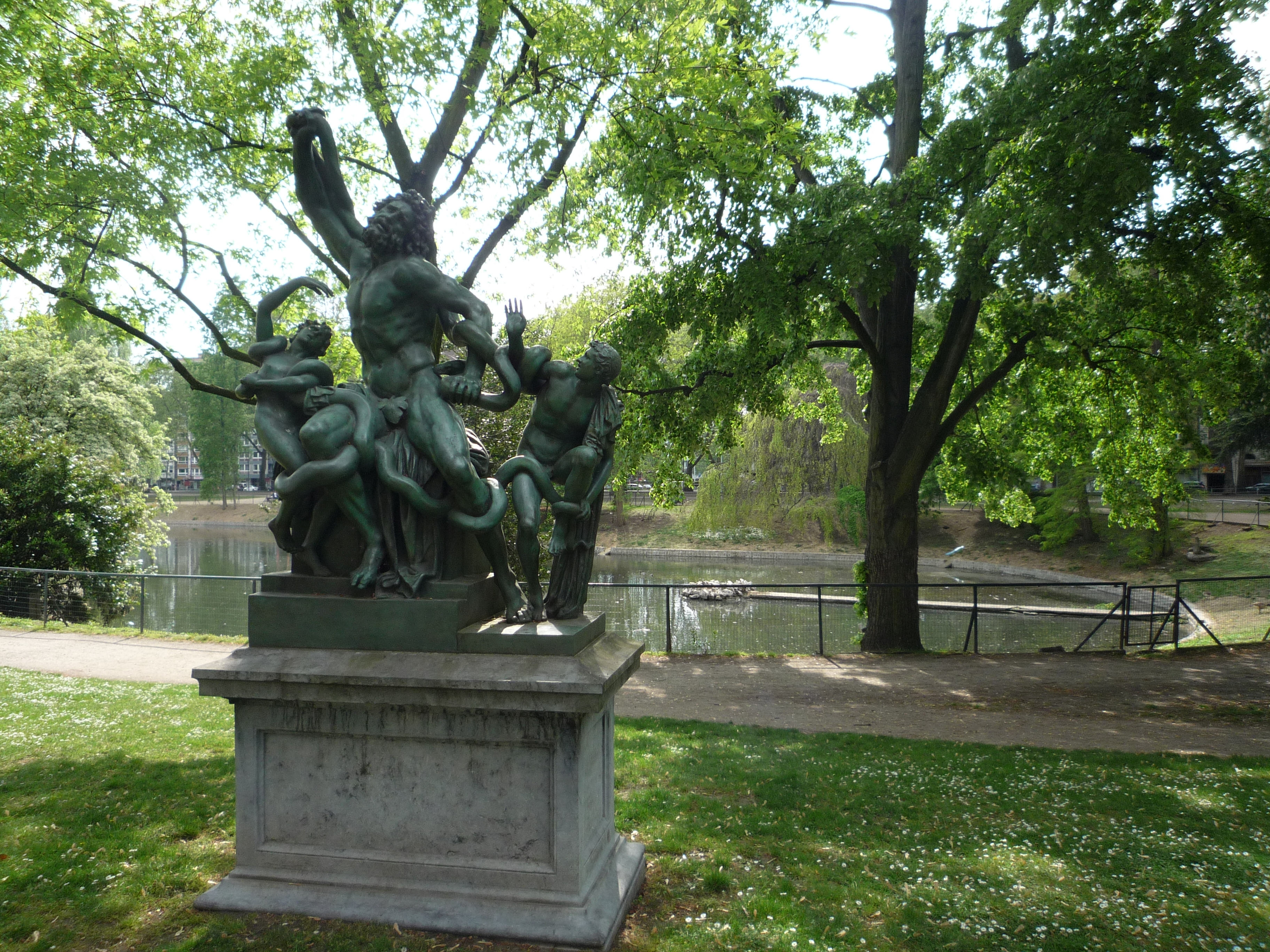 20140425 04 Liège - Parc d'Avroy